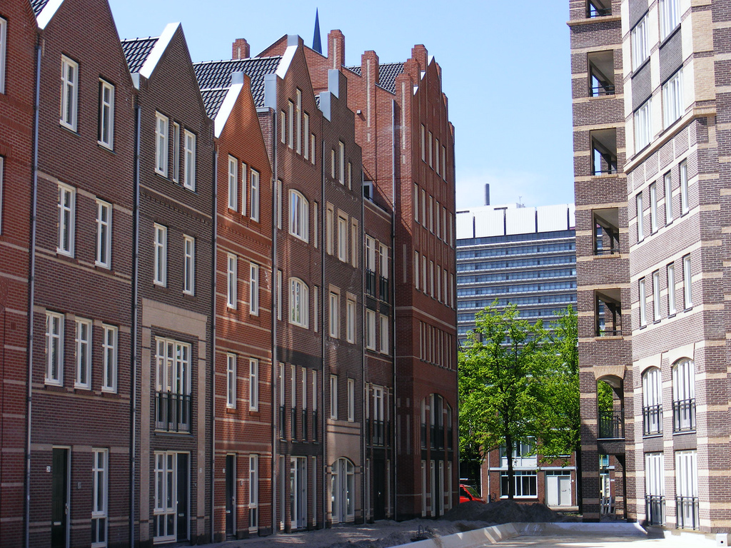 Nieuwbouw in de Rivierenbuurt, Den Haag.